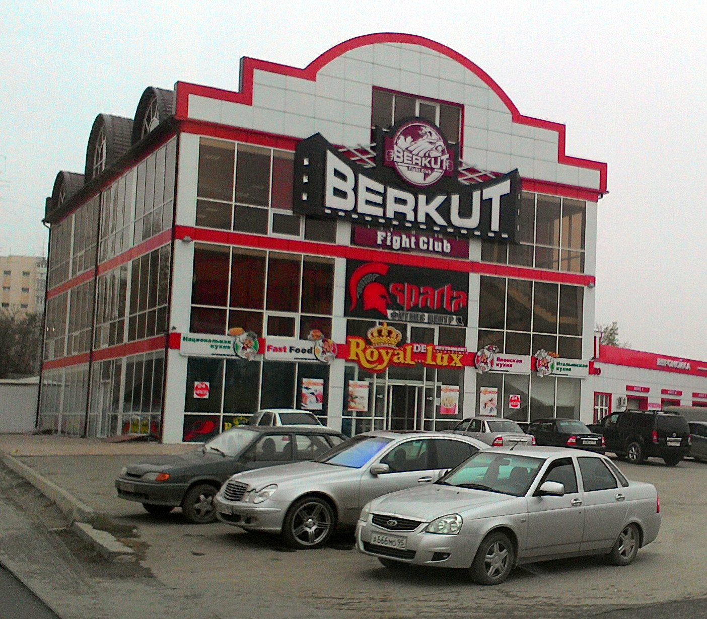 Бойцовский клуб Беркут, один из спортзалов